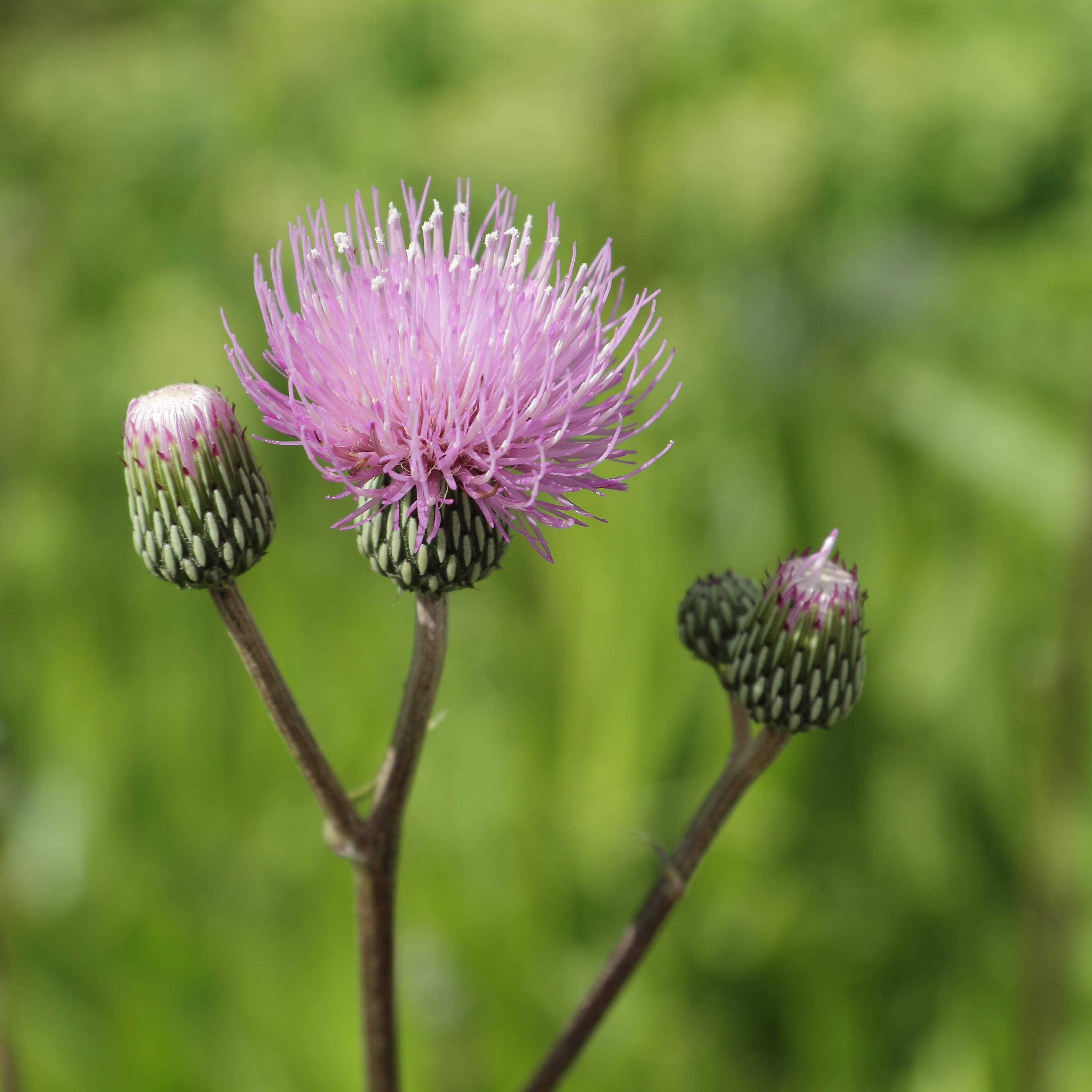 Serratula barrelieri = Klasea pinnatifida at Uppsala Botanic Gardens